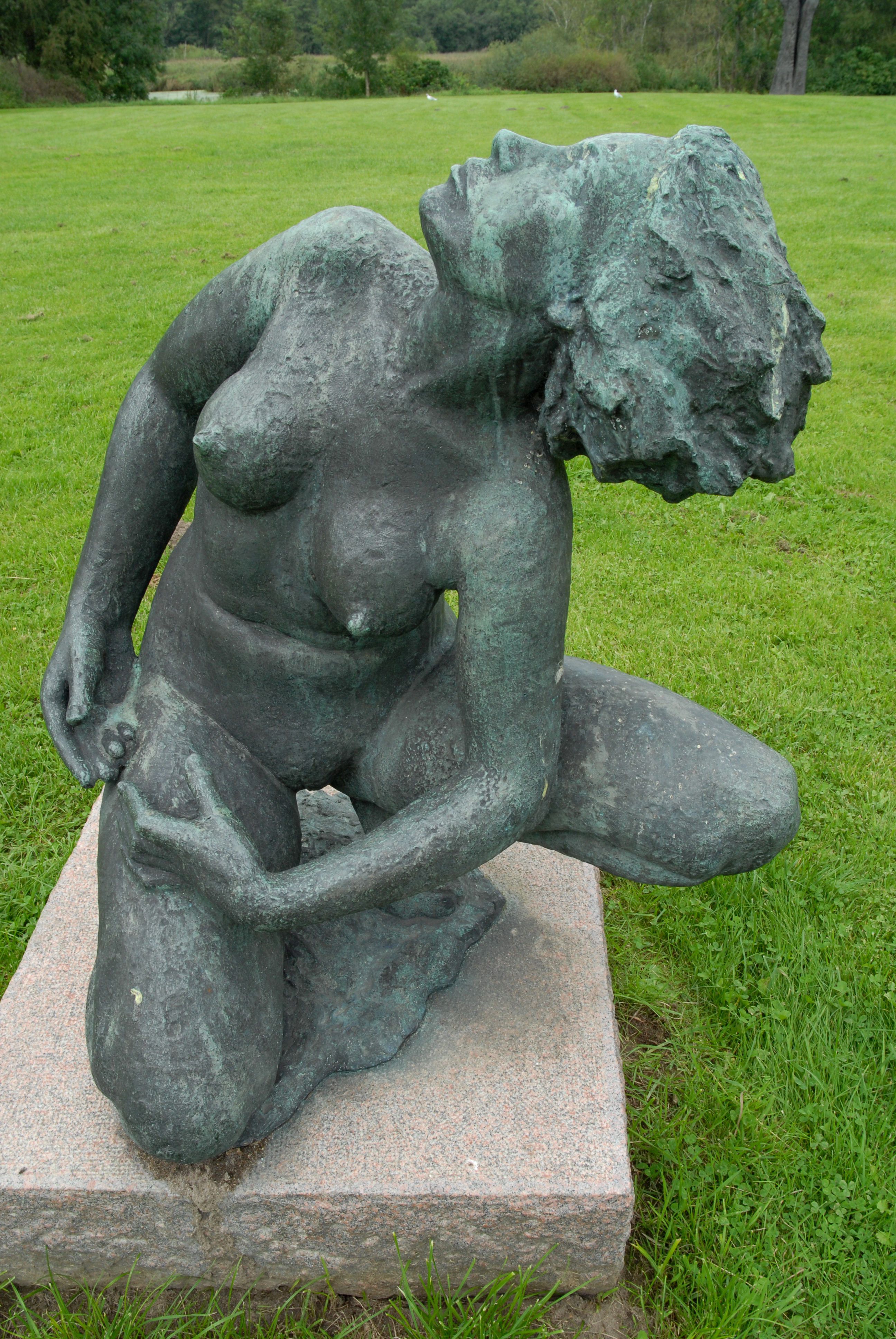 Bronzeplastik "Erscheinung" von Emil Rasmus Jensen (1888-1967) aus dem Jahr 1931. Aufgenommen im Skulpturenpark Schloss Gottorf, Schleswig. Höhe der Figur: 94 cm.